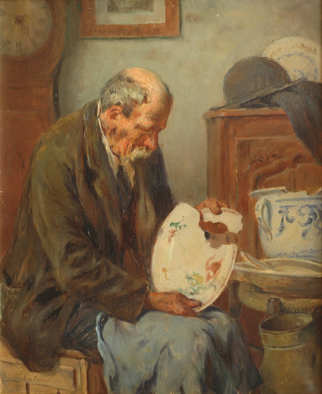 Peinture à l'huile de Jean de FRANCQUEVILLE